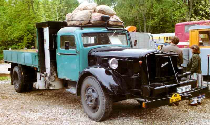 Volvo LV293 Truck 1948